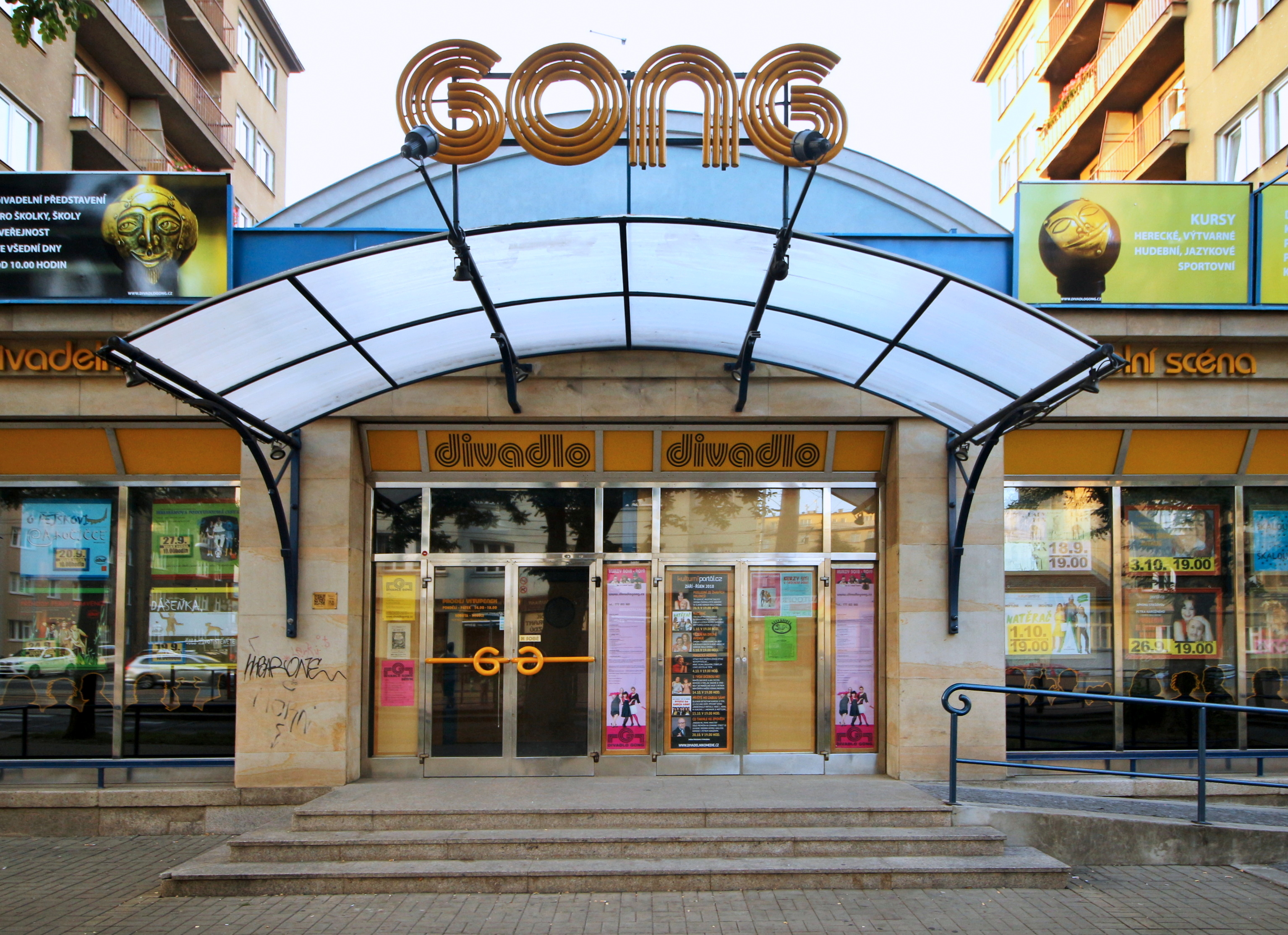 Praha 9-Libeň, Sokolovská ulice - Divadlo GONG